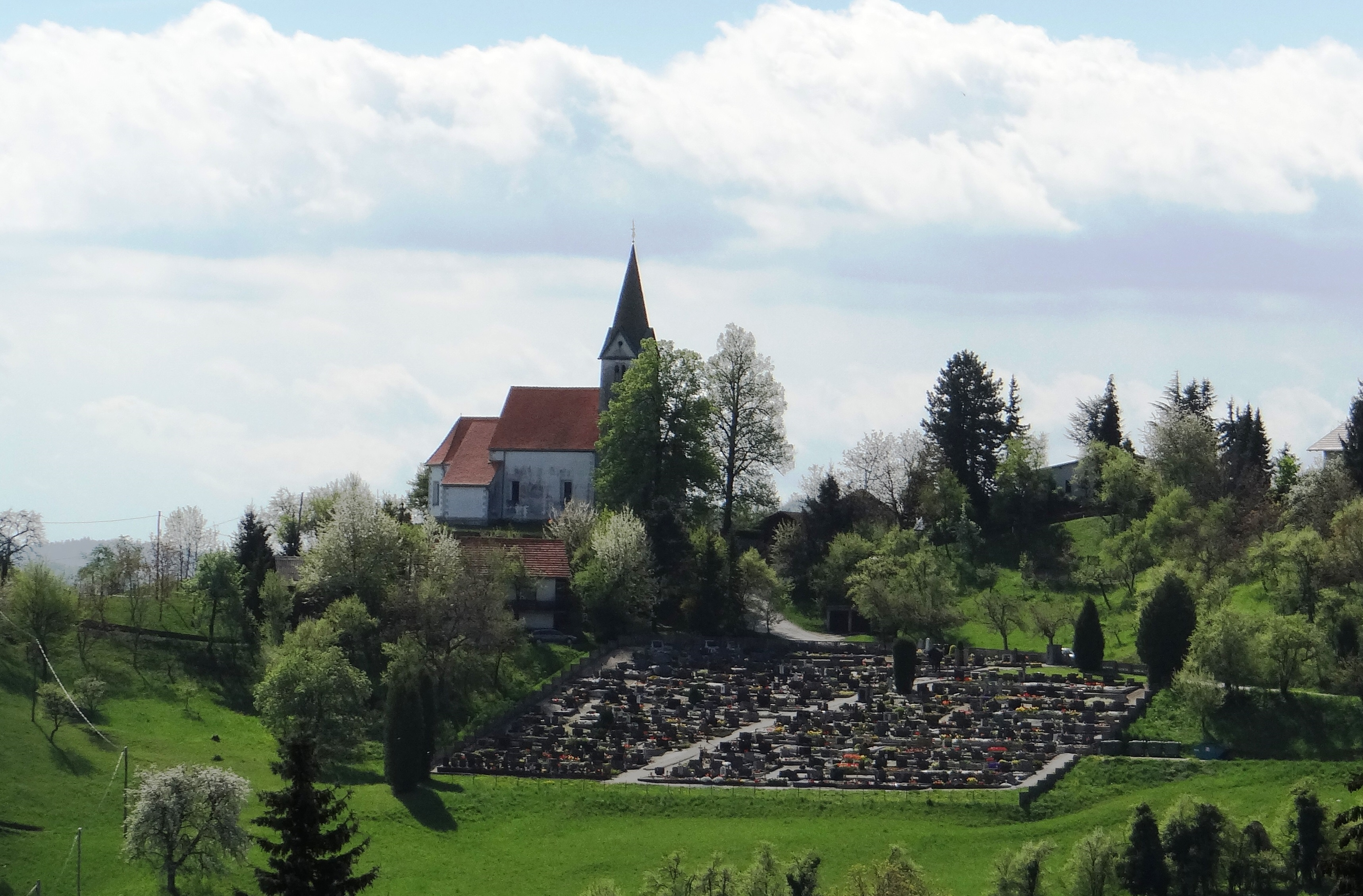 Cerkev Sv.Janeza Krstnika in pokopališče na Slivnici